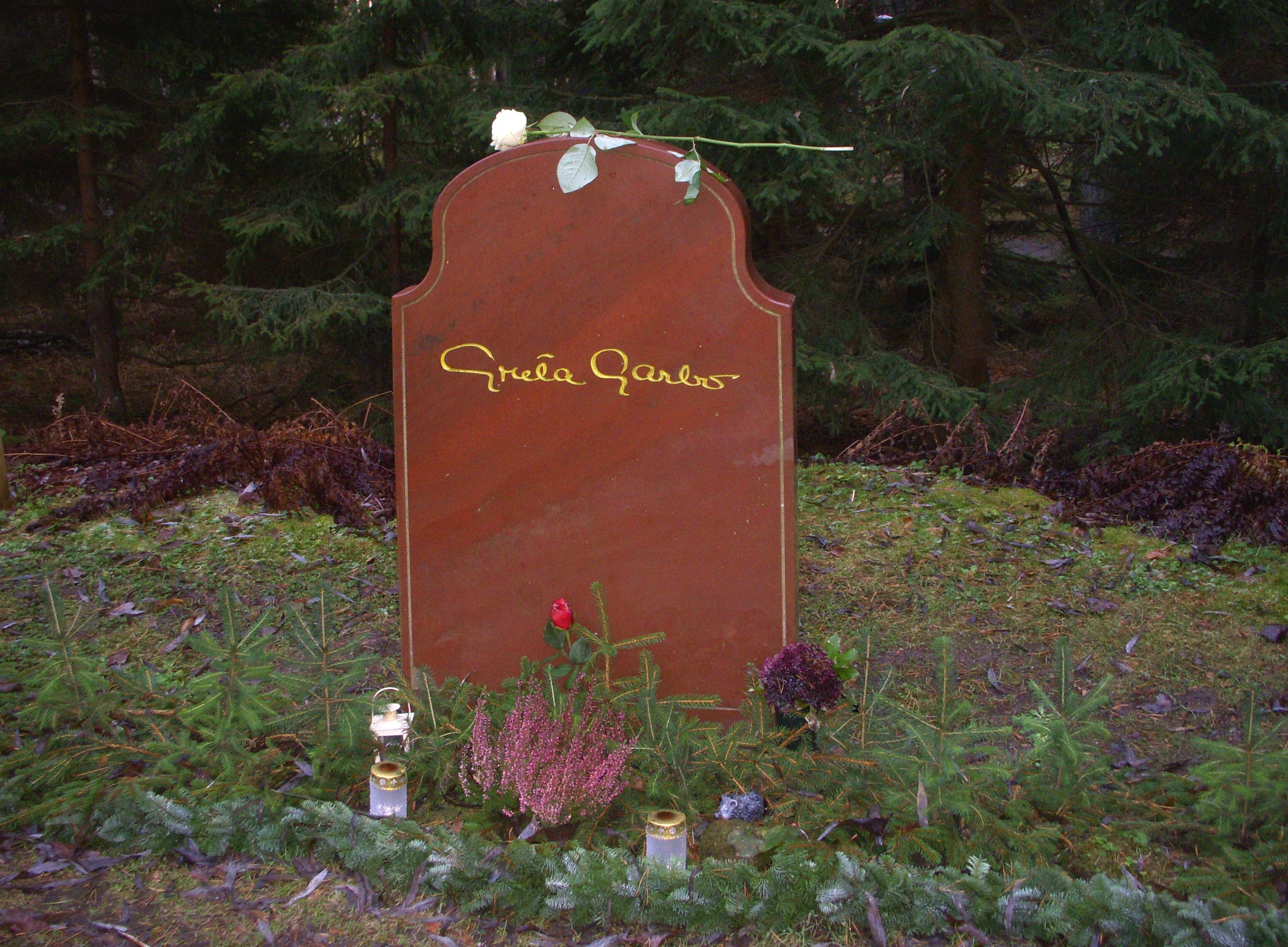 Greta Garbos grav på Skogskyrkogården i Stockholm